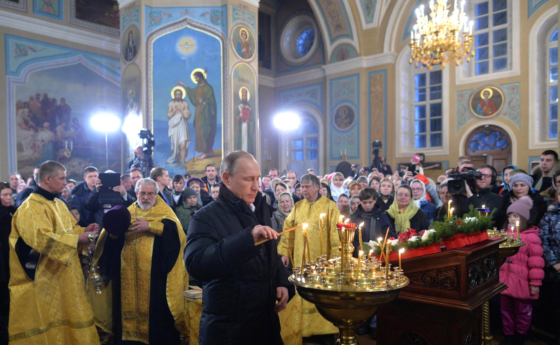 Президент России Владимир Путин на Рождественском богослужении в храме Покрова Пресвятой Богородицы в селе Тургиново Тверской области